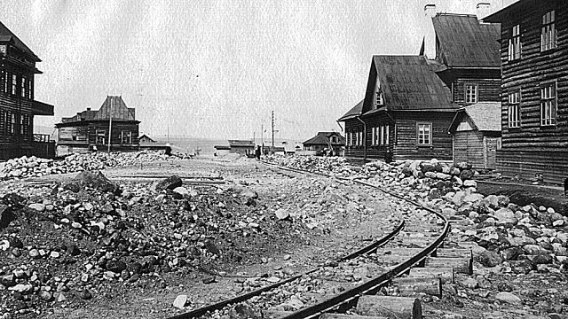 Мурманская декавилька